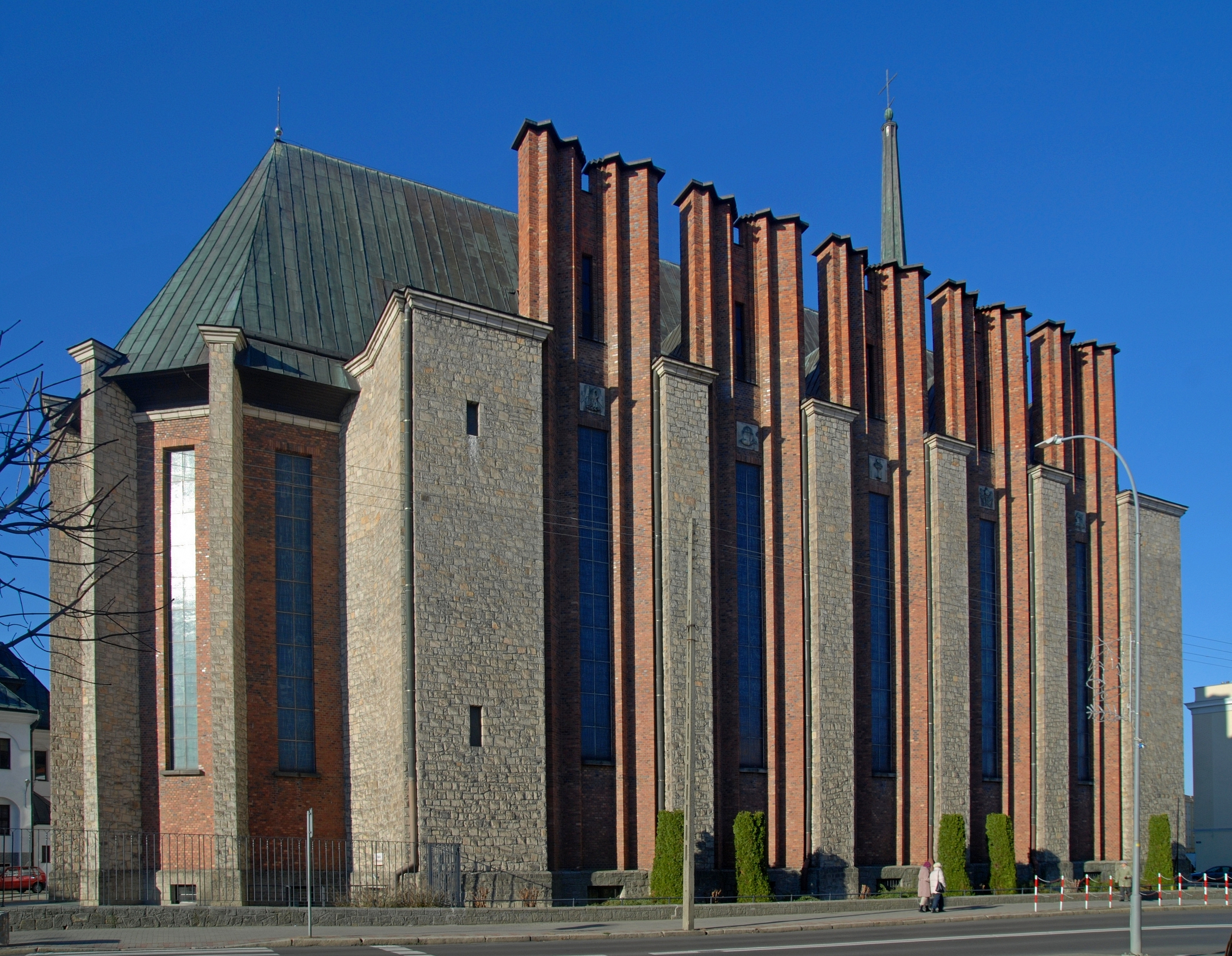 miasto Jasło